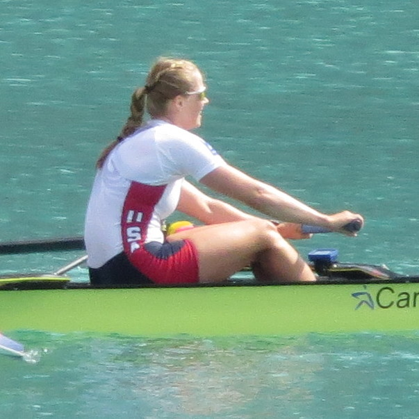 Bateaux en finale du W4- USA : O'BRIEN, Kristine LATZ, Grace MARTELLI, Adrienne LUCZAK, Grace